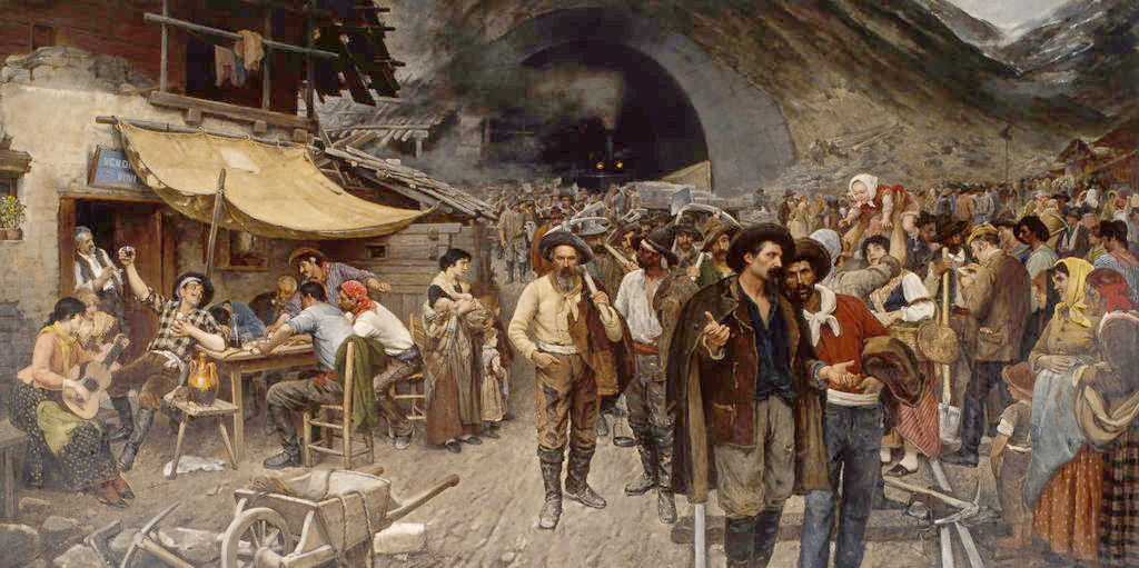 Schichtwechsel beim Bau des Gotthards-Tunnels